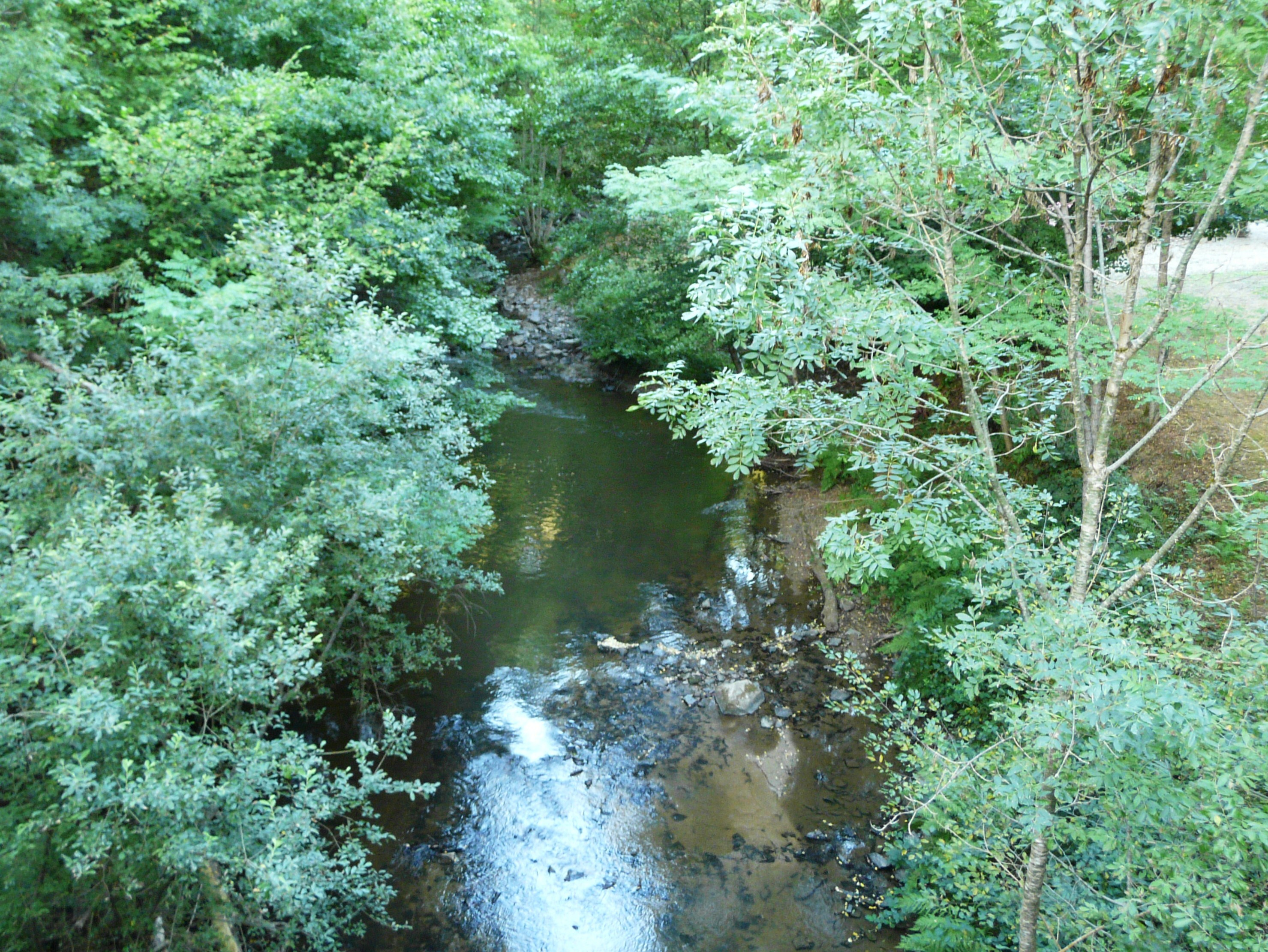 La Loyre en amont du pont de la Peyrade (route départementale 9E2), entre Beyssac (à gauche) et Orgnac-sur-Vézère (à droite) ; Corrèze, France.